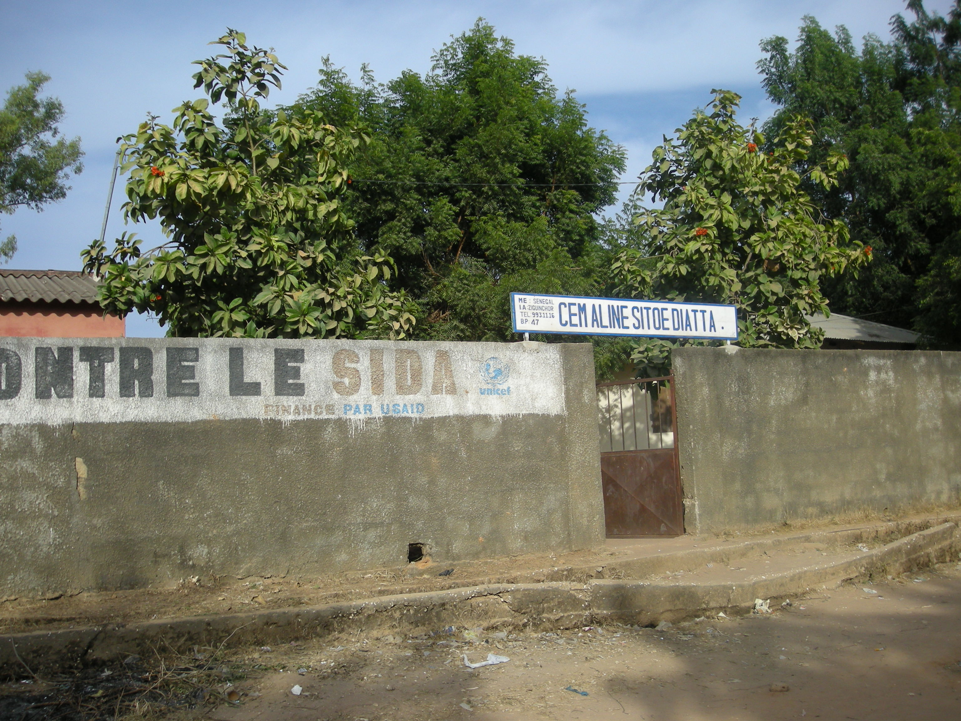 Le CEM (Collège d'enseignement moyen) "Aline Sitoé Diatta" à Oussouye (Casamance, Sénégal)